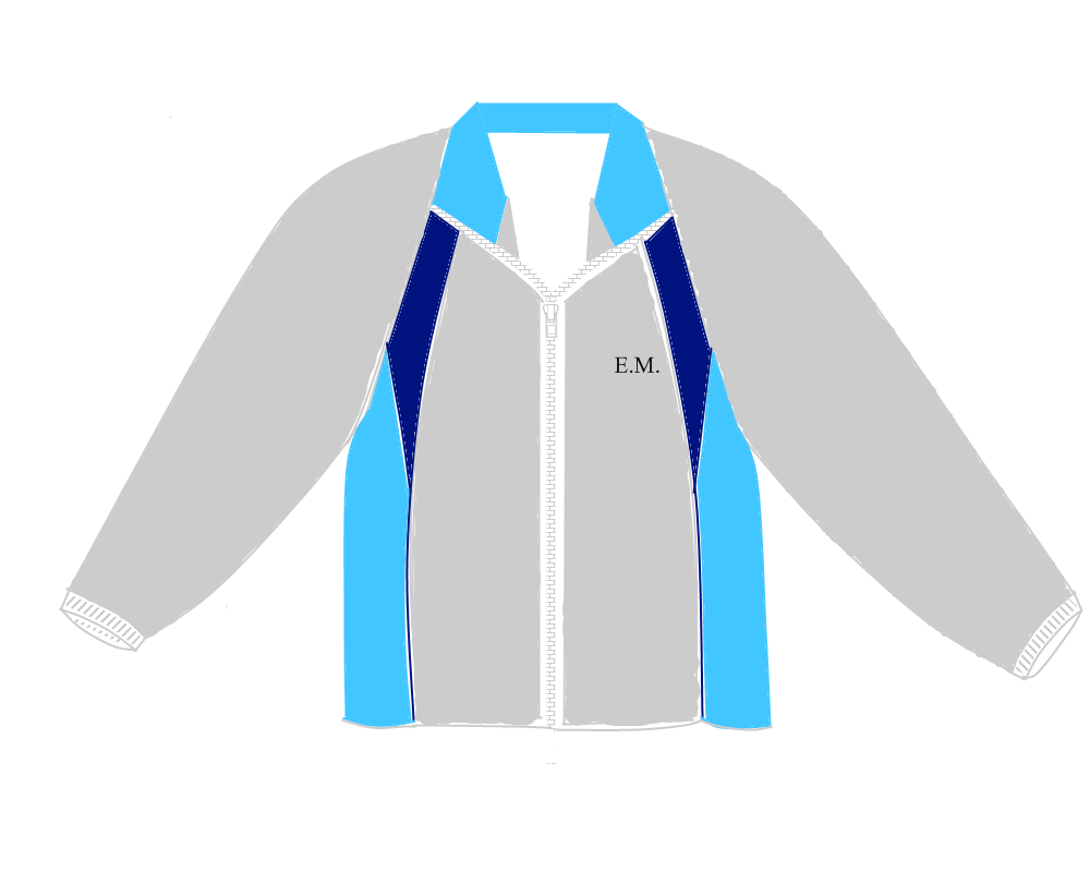 Estrela Do Mar School Uniform